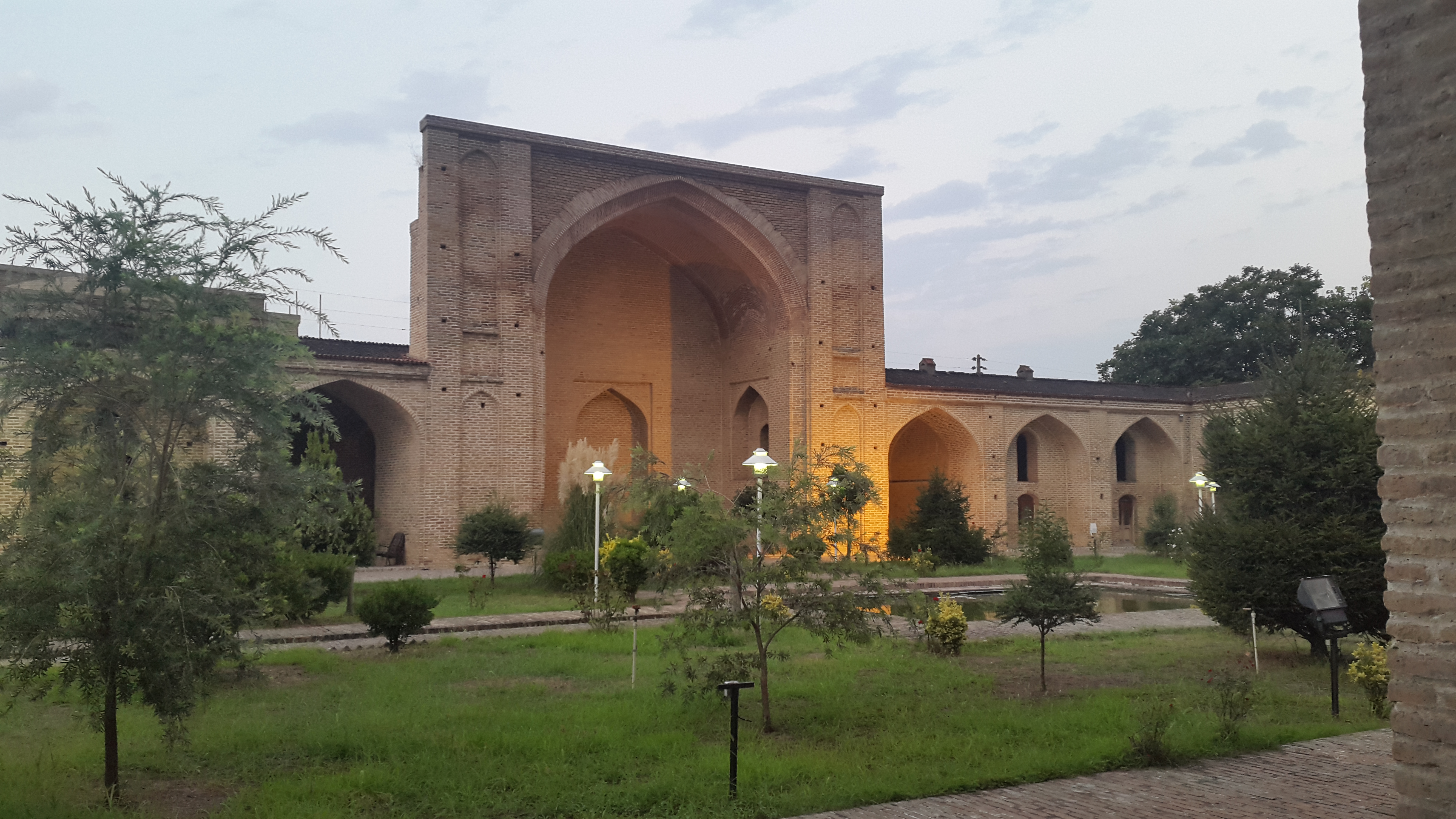 مسجد جامع فرح آباد ساری - صحن - نمای شمالی